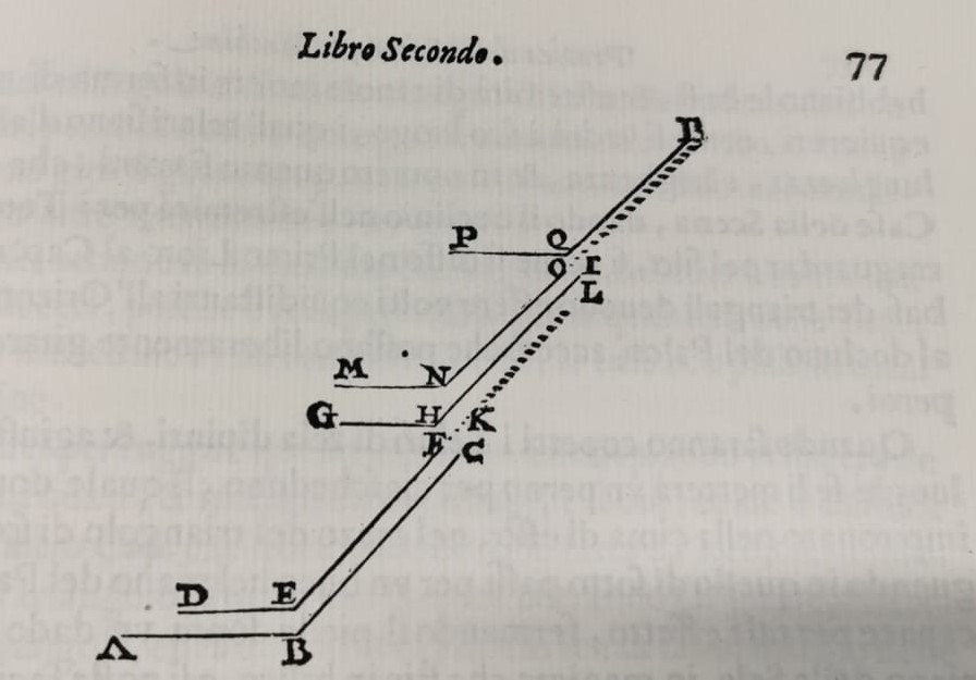 Hier sieht man eine Skizze von Eckflügel von Nicola Sabbatini.